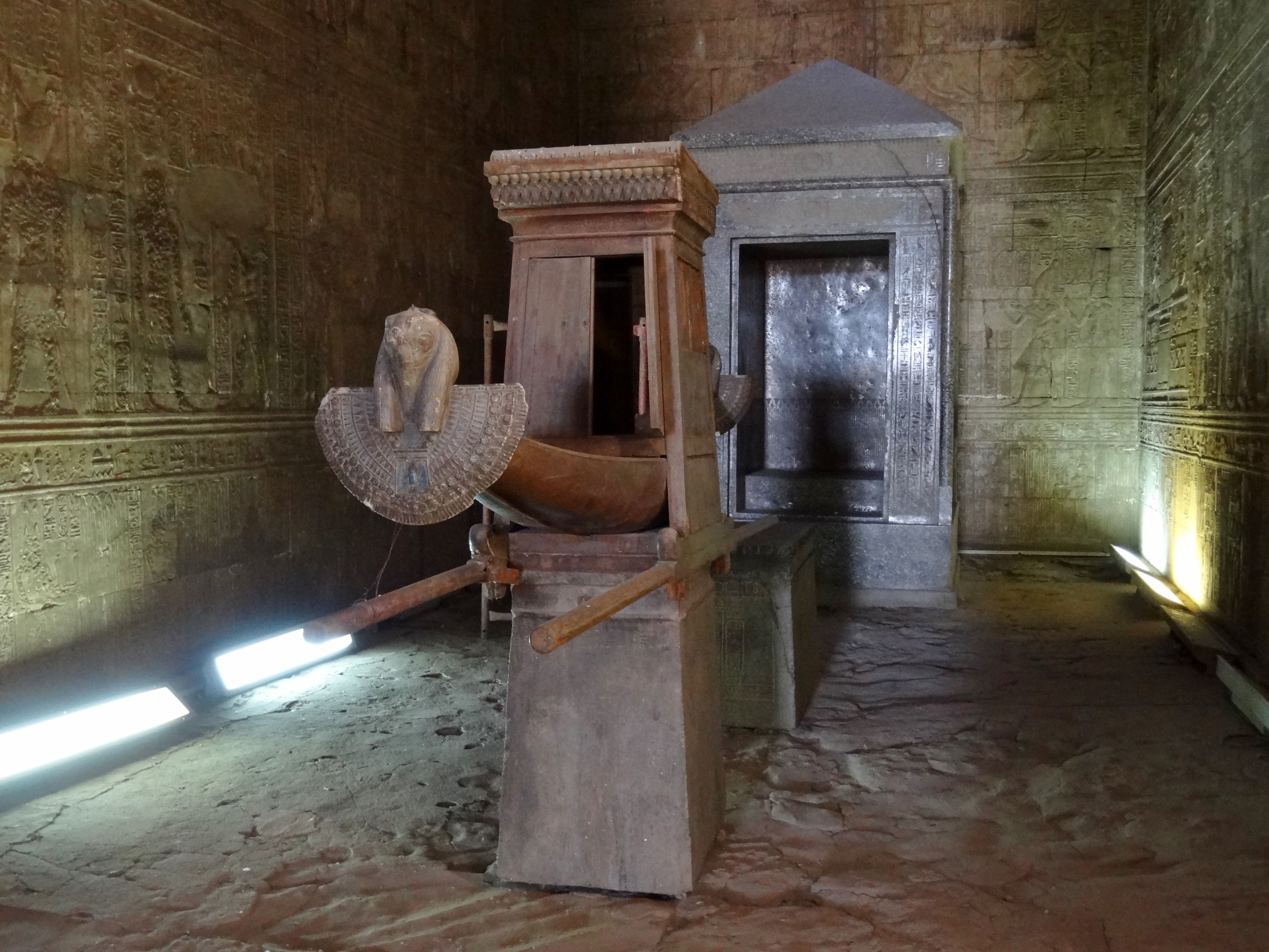 Heiligtum (Sanktuar) im Tempel von Edfu, Ägypten